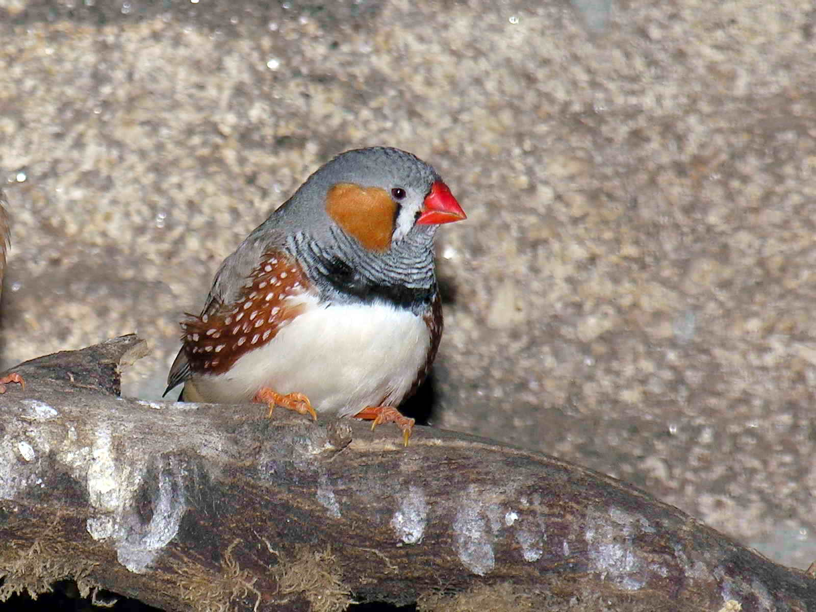 Taeniopygia guttata castanotis (Zebra finch)